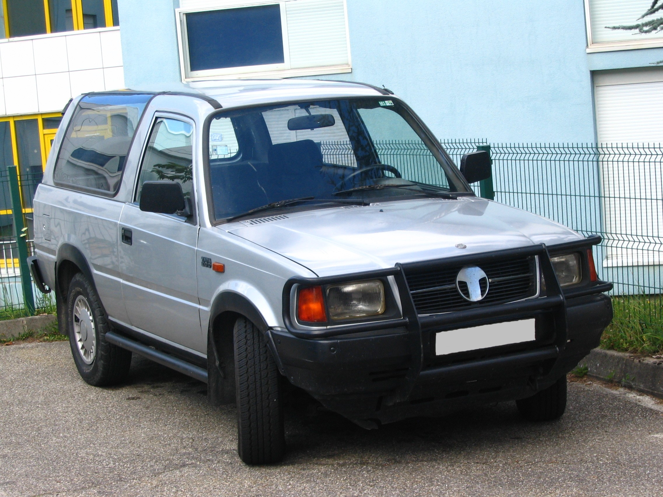 Tout-terrain Tata Sierra (base Mercedes) dans une ville française - millésime inconnu.